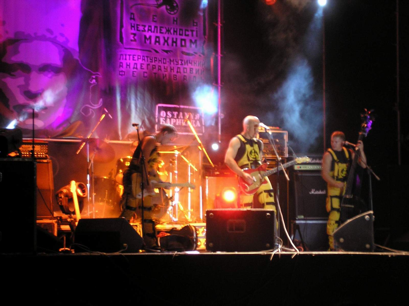 Гурт "Ot_Vinta!" на Махнофесті-2006 у місті Гуляйполе.